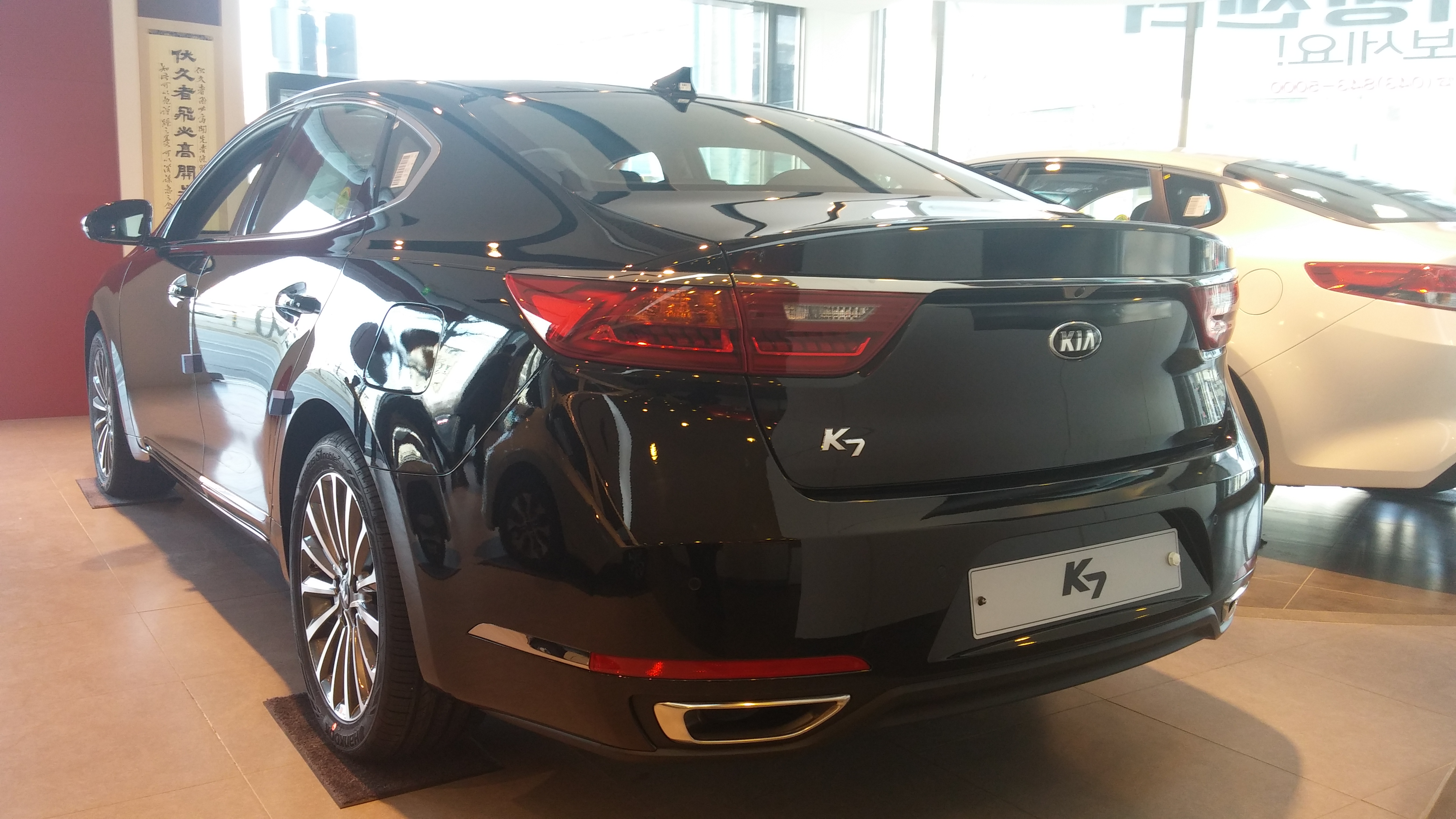 기아 올 뉴 K7 후측면